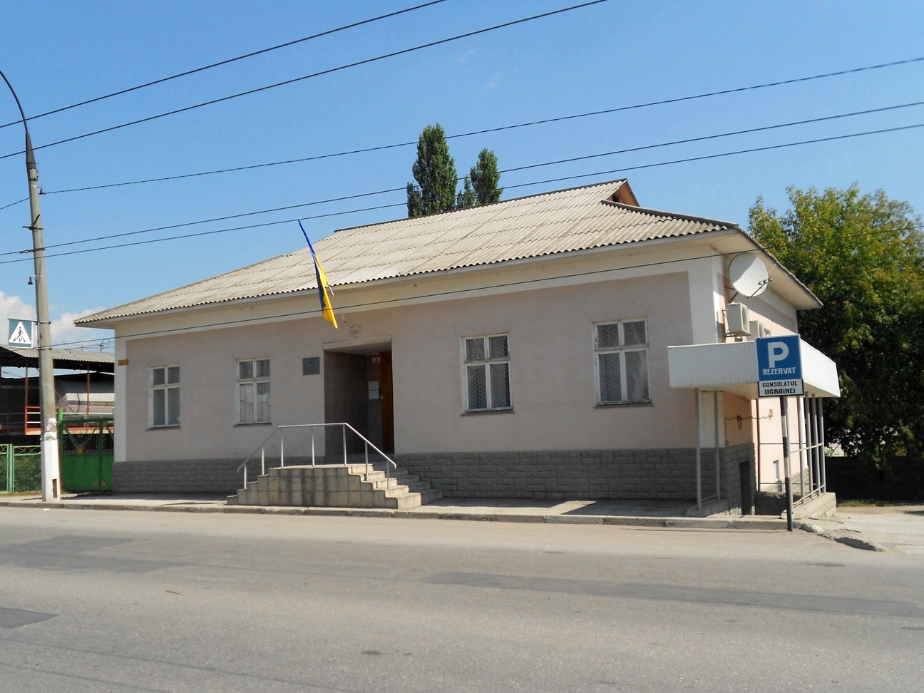 Consulatul Ucrainei în municipul Bălți